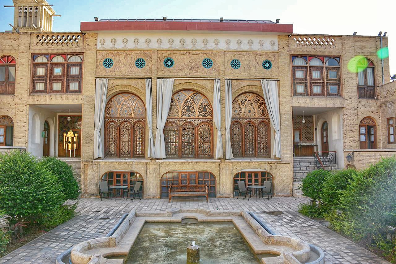 عمارت کاظمی